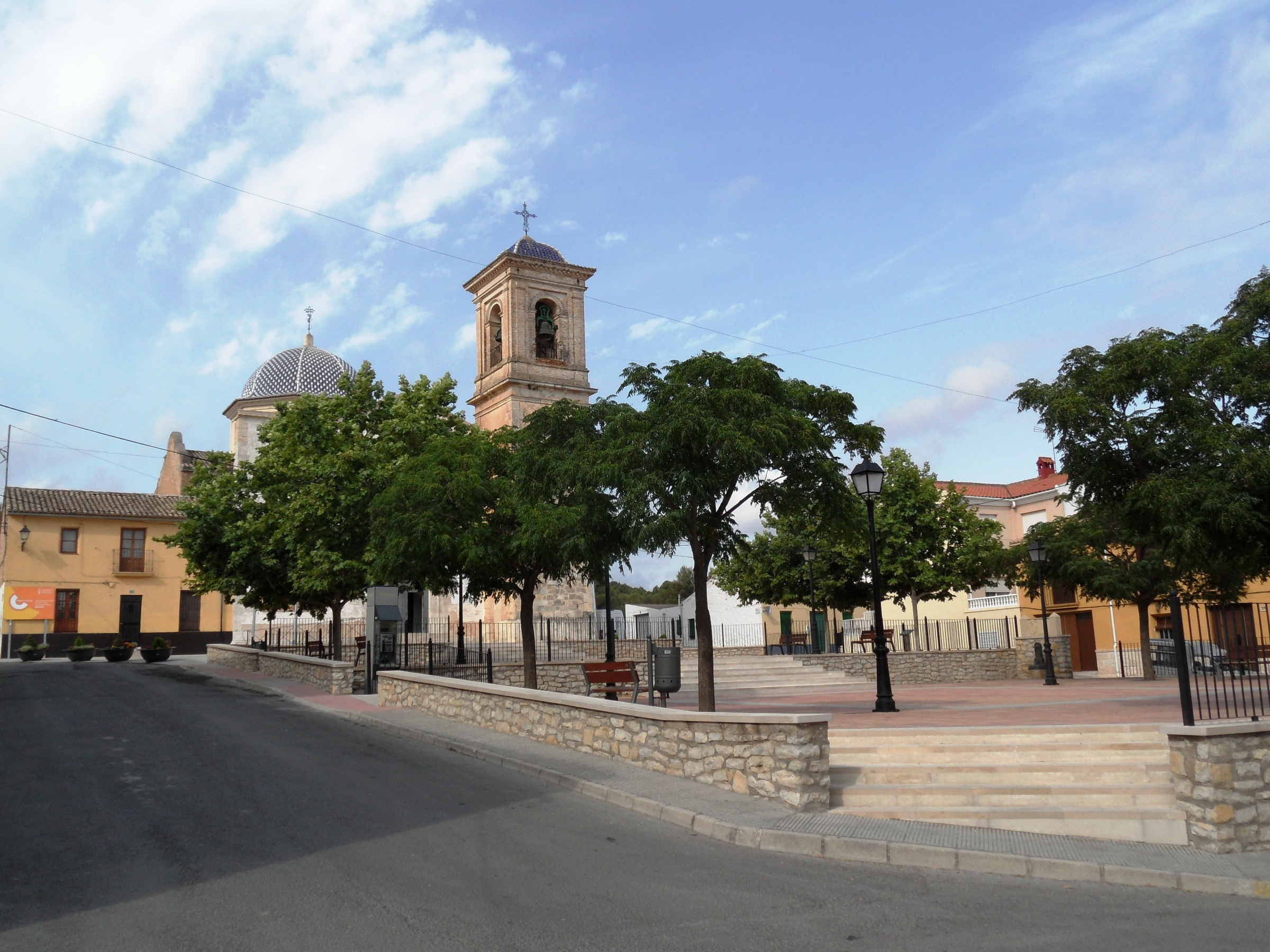 Plaça d'Espanya, amb l'església de Sant Bartomeu al fons.